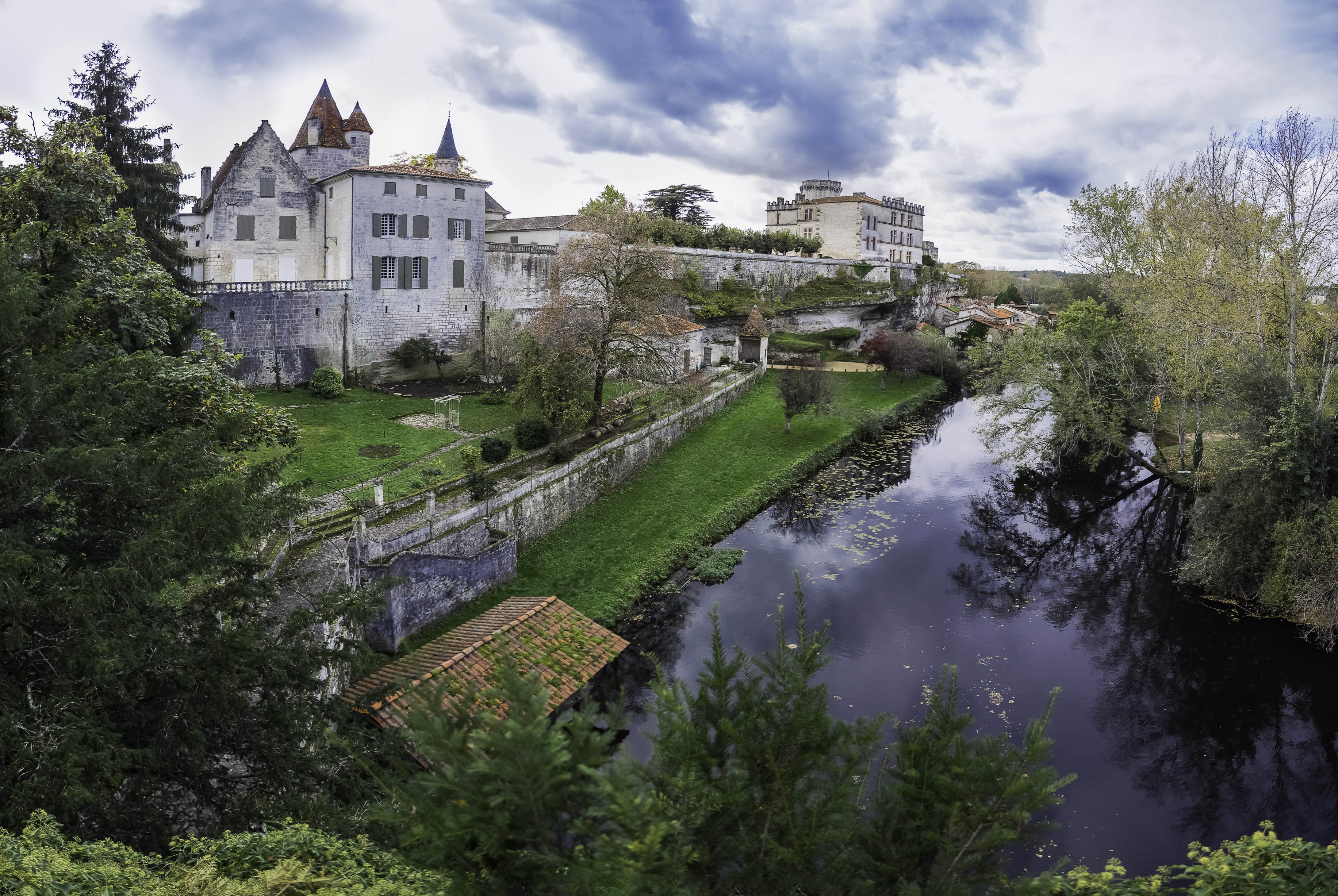 Châteaux de Bourdeilles